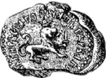 Ульяновская область, старый герб, изображение есть на сохранившейся печати Симбирска